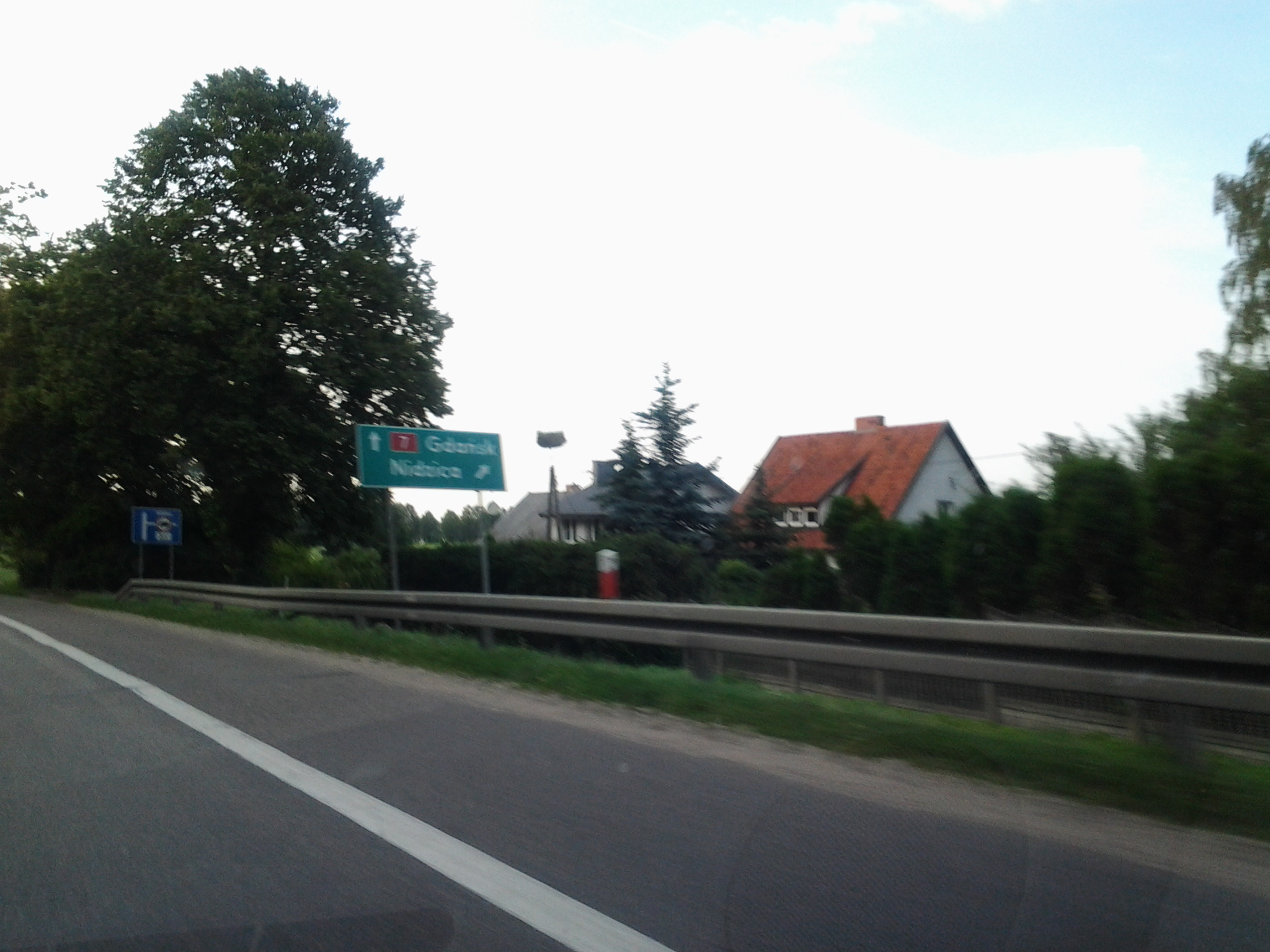 Bocianie gniazdo w Tatarach